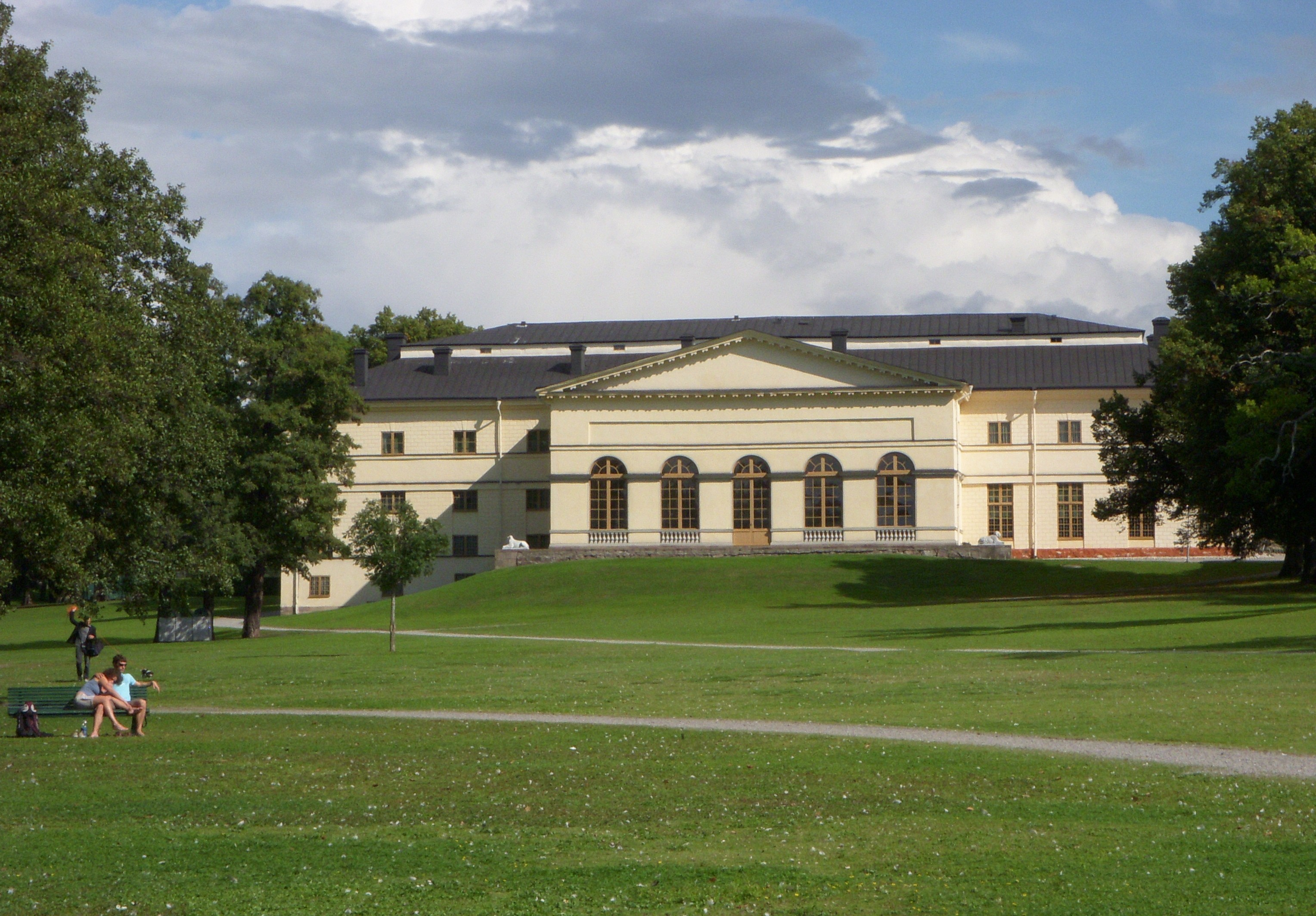 Drottningholms slottsteater, fasad mot engelska parken